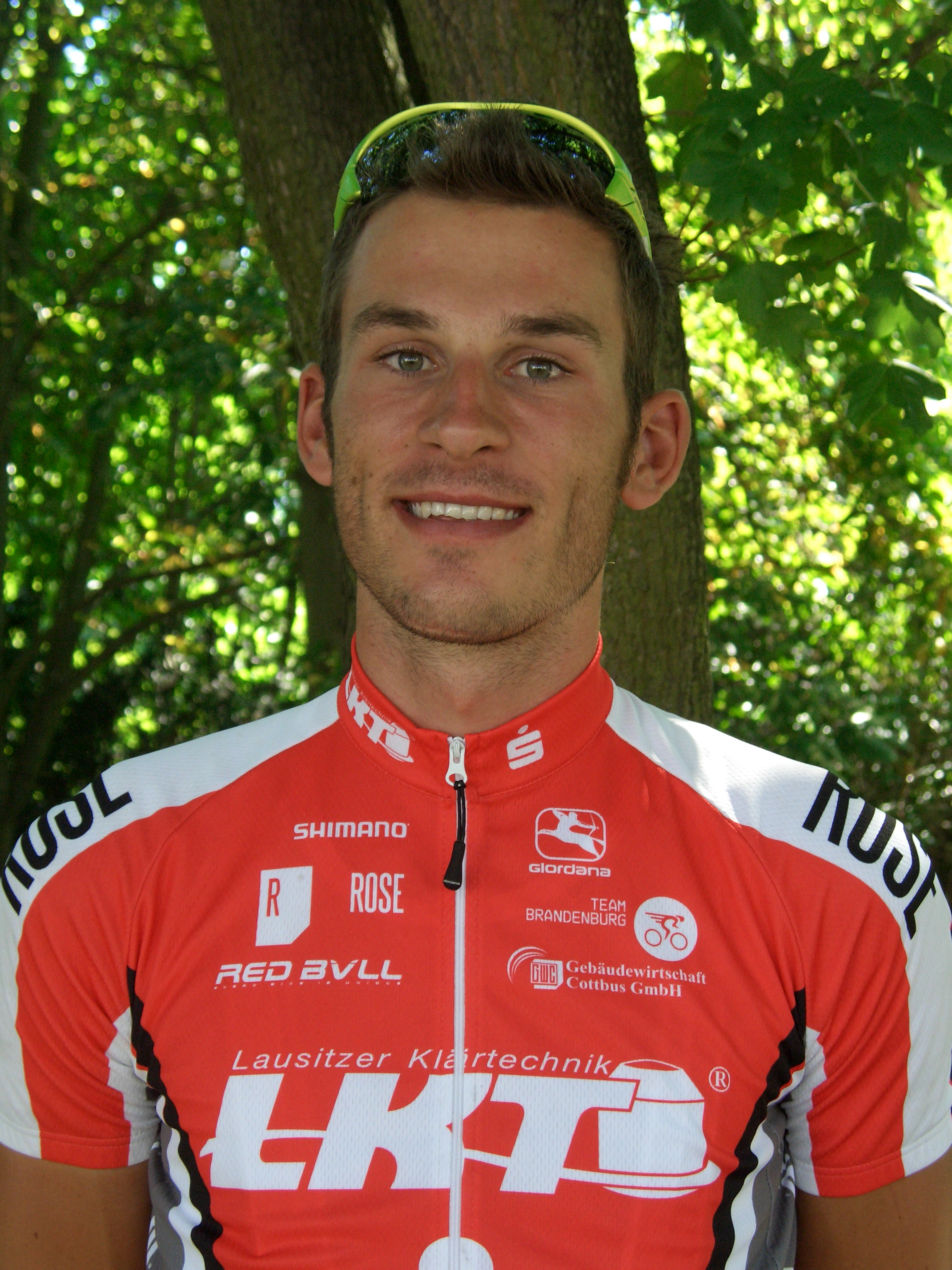 Stefan Schäfer, Radsportler